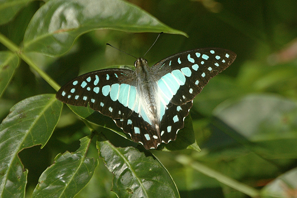 Pale Triangle Graphium euryplus Mt Mee, SE Queensland